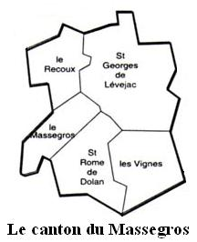 Le canton du Massegros Image personnelle